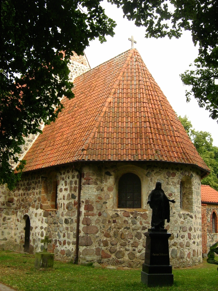 Apsis der Kirche in Behren-Lübchin (Landkreis Güstrow, Mecklenburg-Vorpommern). Sie ist ein Feldsteinbau mit eingezogenem Chor und halbrunder, außen dreiseitiger Apsis aus dem 13. Jh. Der quadratische Turm wurde etwas später vorgesetzt. Er ist breiter als das Schiff. Sein achteckiger Aufsatz mit geschweifter Haube und Laterne ist barock. (Quelle: Die Bau- und Kunstdenkmale in der DDR, Teil Bezirk Neubrandenburg - Henschelverlag Kunst und Gesellschaft - 1982)